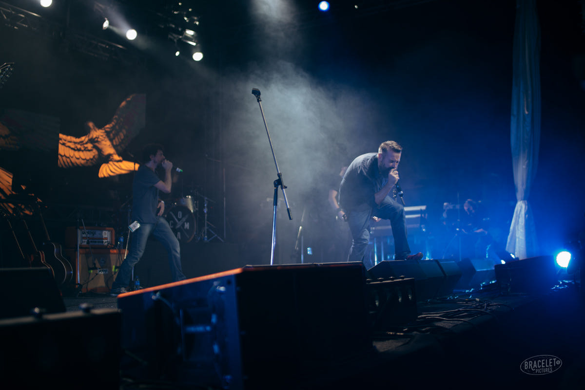 Coma - lansare album Orizont @ Arenele Romane